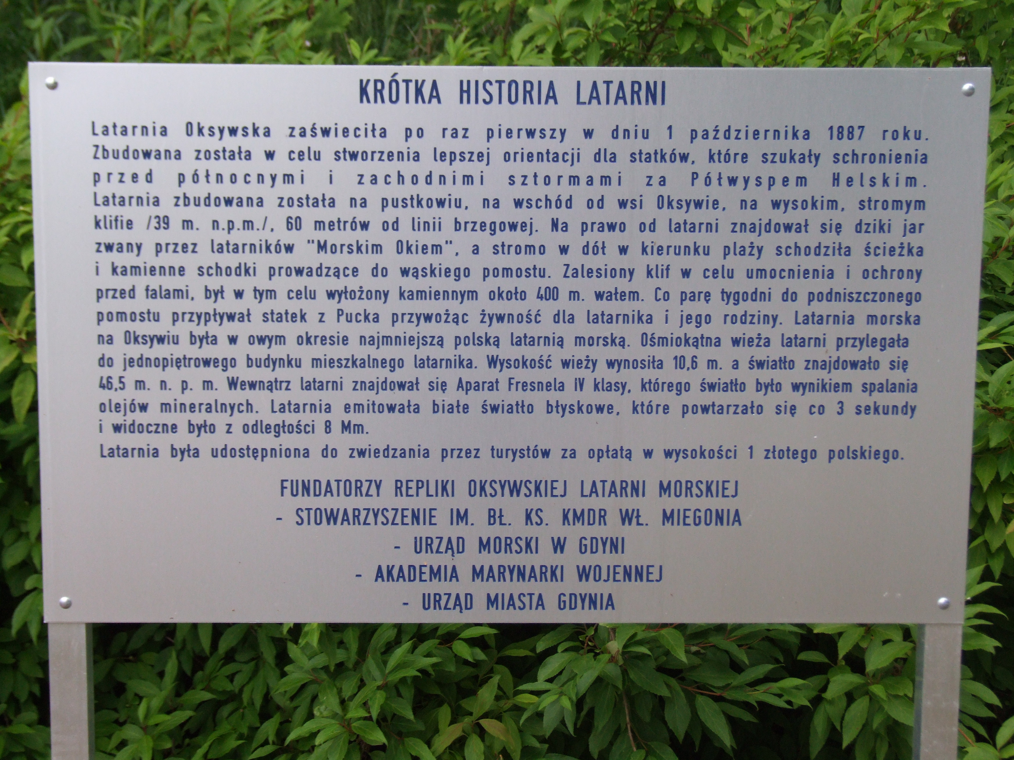 Gdynia-Oksywie Cmentarz Marynarki Wojennej